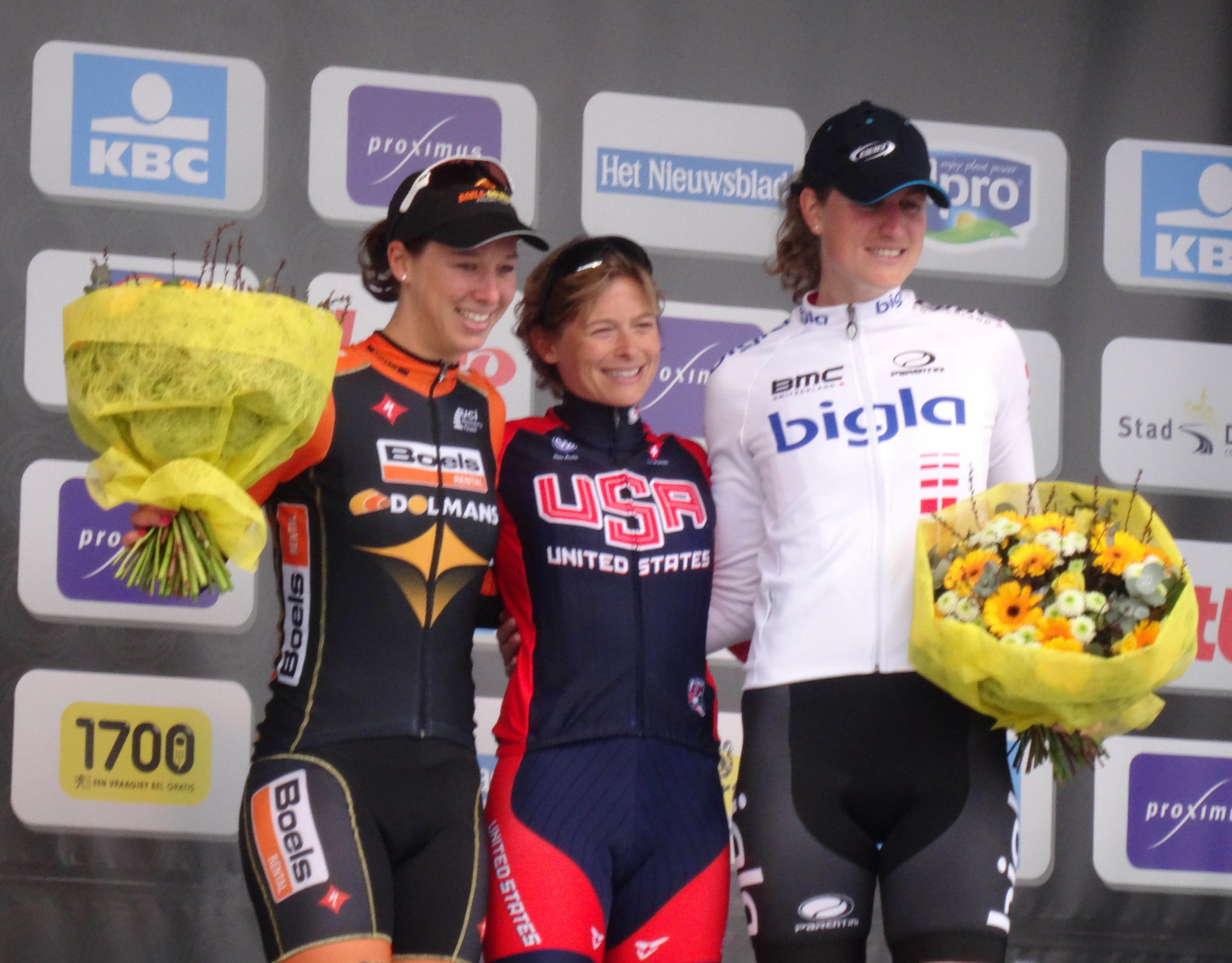 Reportage photographique réalisé le dimanche 30 mars à l'occasion de l'arrivée de Gand-Wevelgem 2014 à Wevelgem, Belgique.